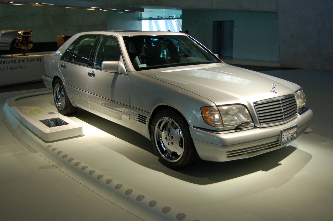 Arnold Schwarzenegger's Mercedes Benz S class